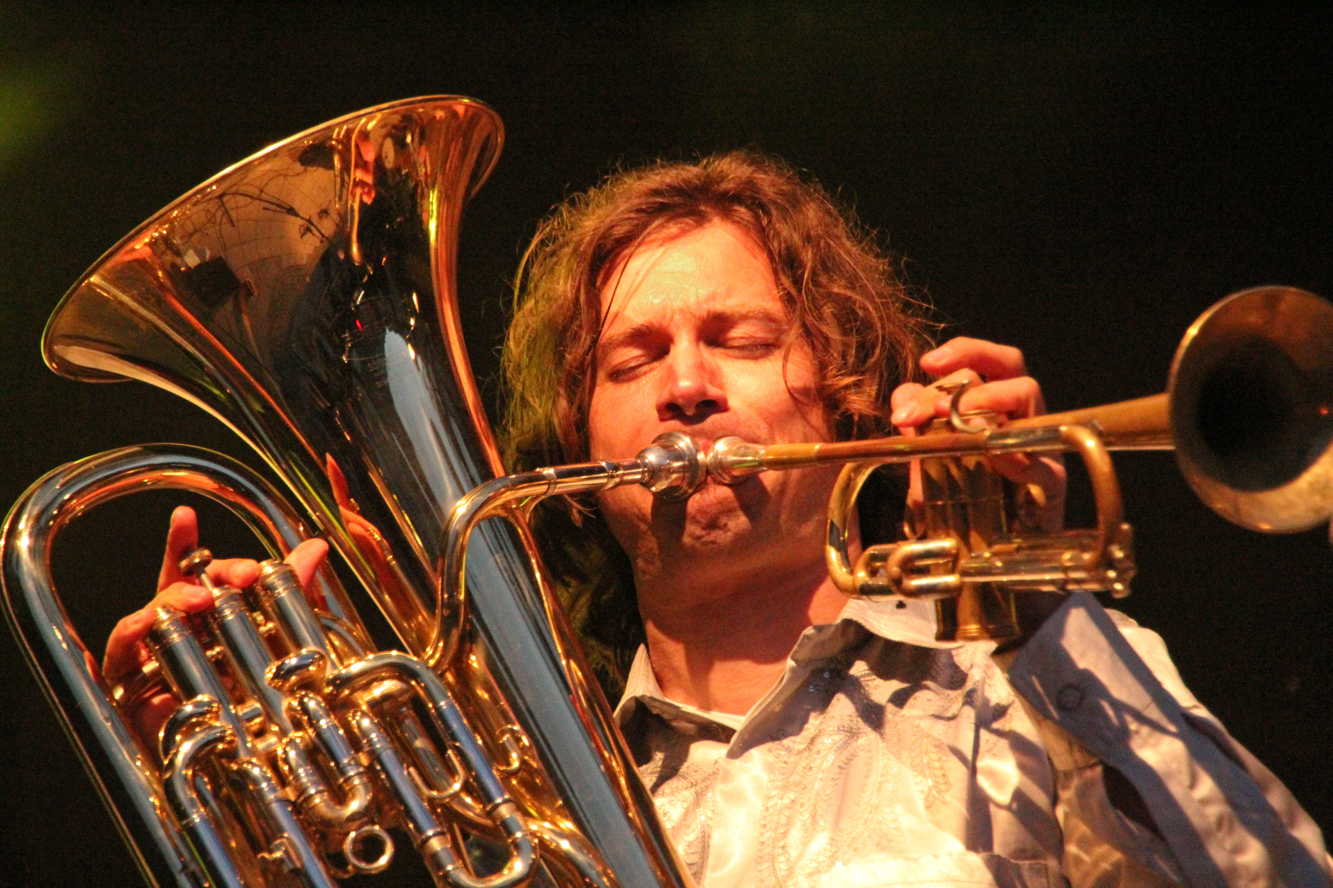 Bildinhalt: Matthias Schriefl bei den Jazztagen Idar-Oberstein 2017 Aufnahmeort: Idar-Oberstein, Deutschland Die dargestellte Person wurde bei einem öffentlichen Auftritt fotografiert.